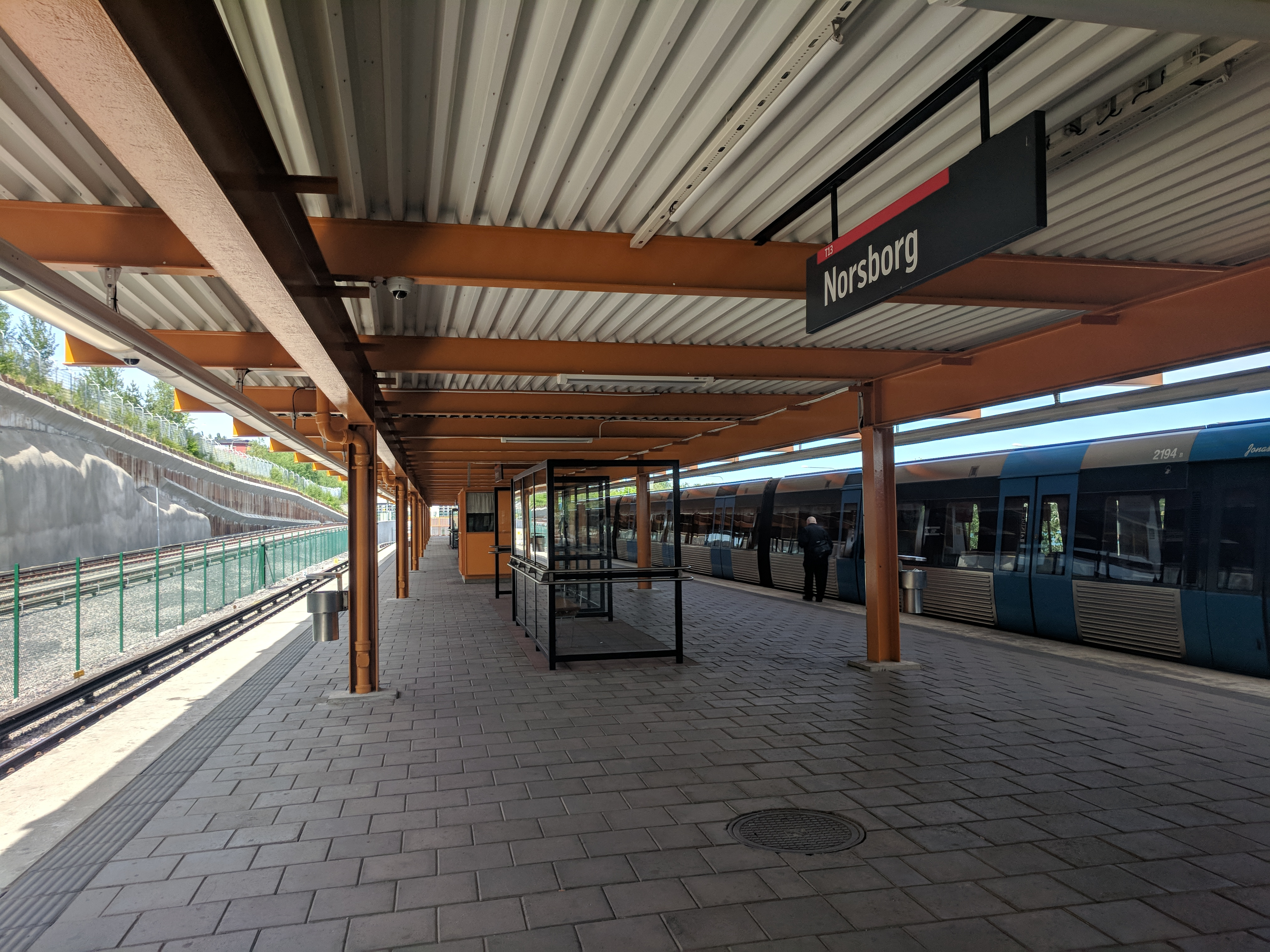 Norsborg tunnelbana